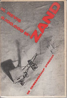 Omslag van het boek 8.100.000 m3 zand van de Nederlandse schrijver M. Revis. Het ontwerp is naar alle waarschijnlijkheid in 1931 gemaakt door Andries Oosterbaan (1882-1935). Zie Lex van de Haterd: 'Van boekbinder tot grafisch vormgever'. In: Zacht Lawijd, 3: 1 (2003)